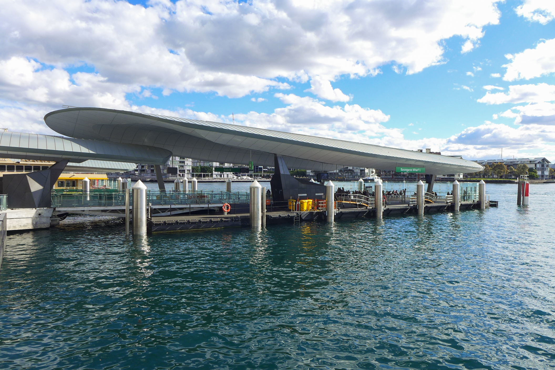 Barangaroo Wharf 1